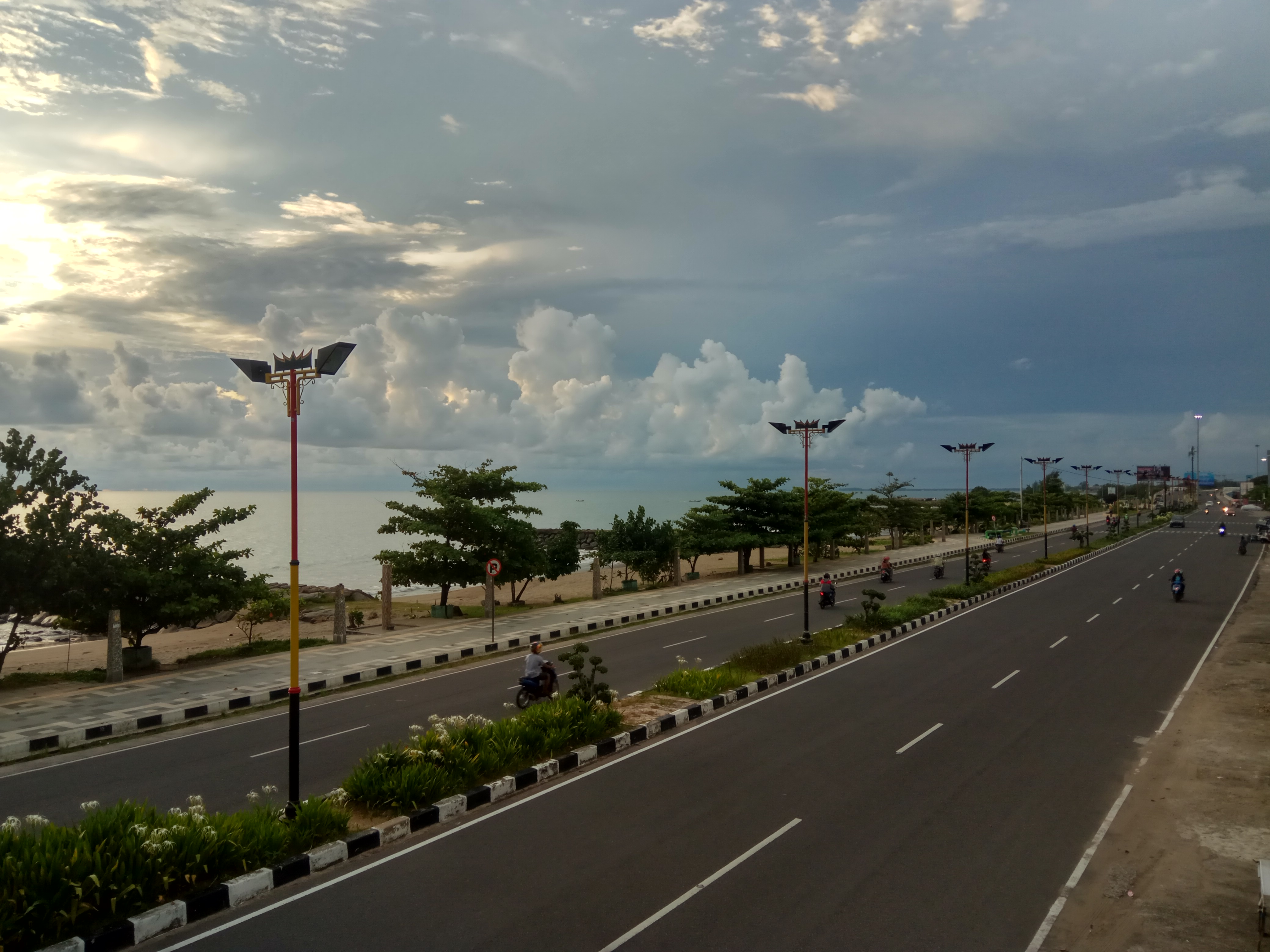 Jalanan di Padang selama pandemi koronavirus di Indonesia